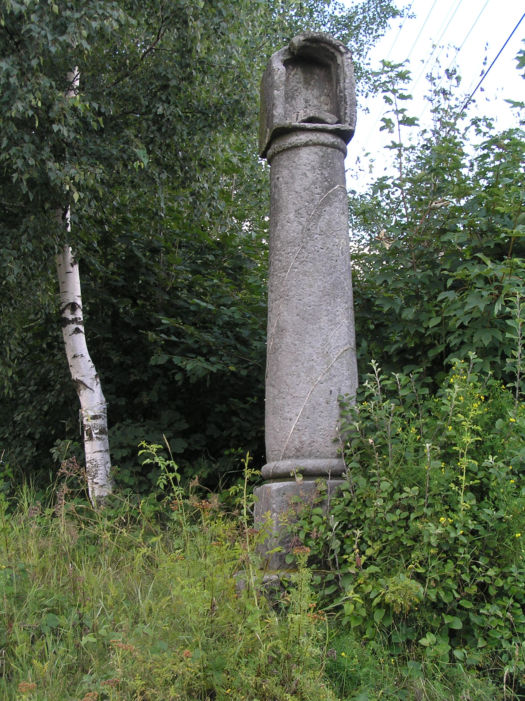 Boží muka, Pelíkovice.